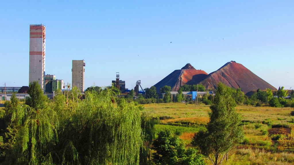 Терекони шахти "Красний партизан"